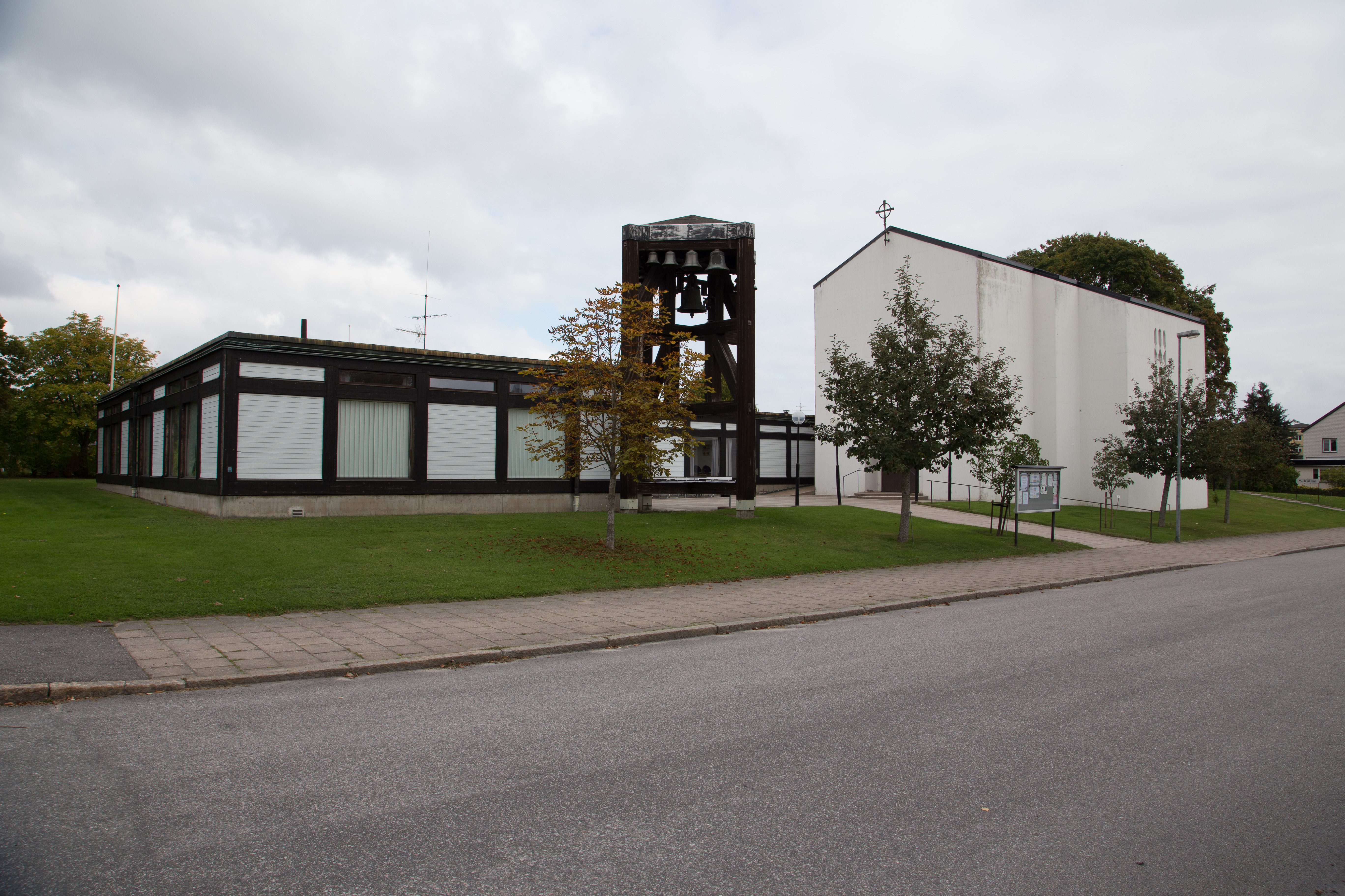 Nävertorpskyrkan (Mejseln 5)